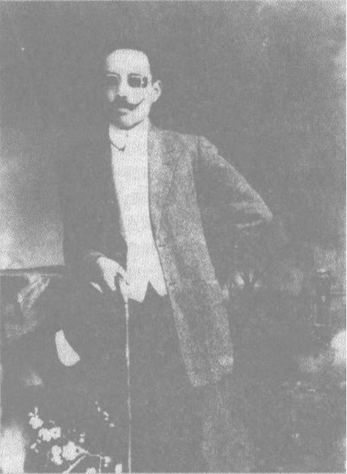 Korean independent activist Shin Gyu-shik